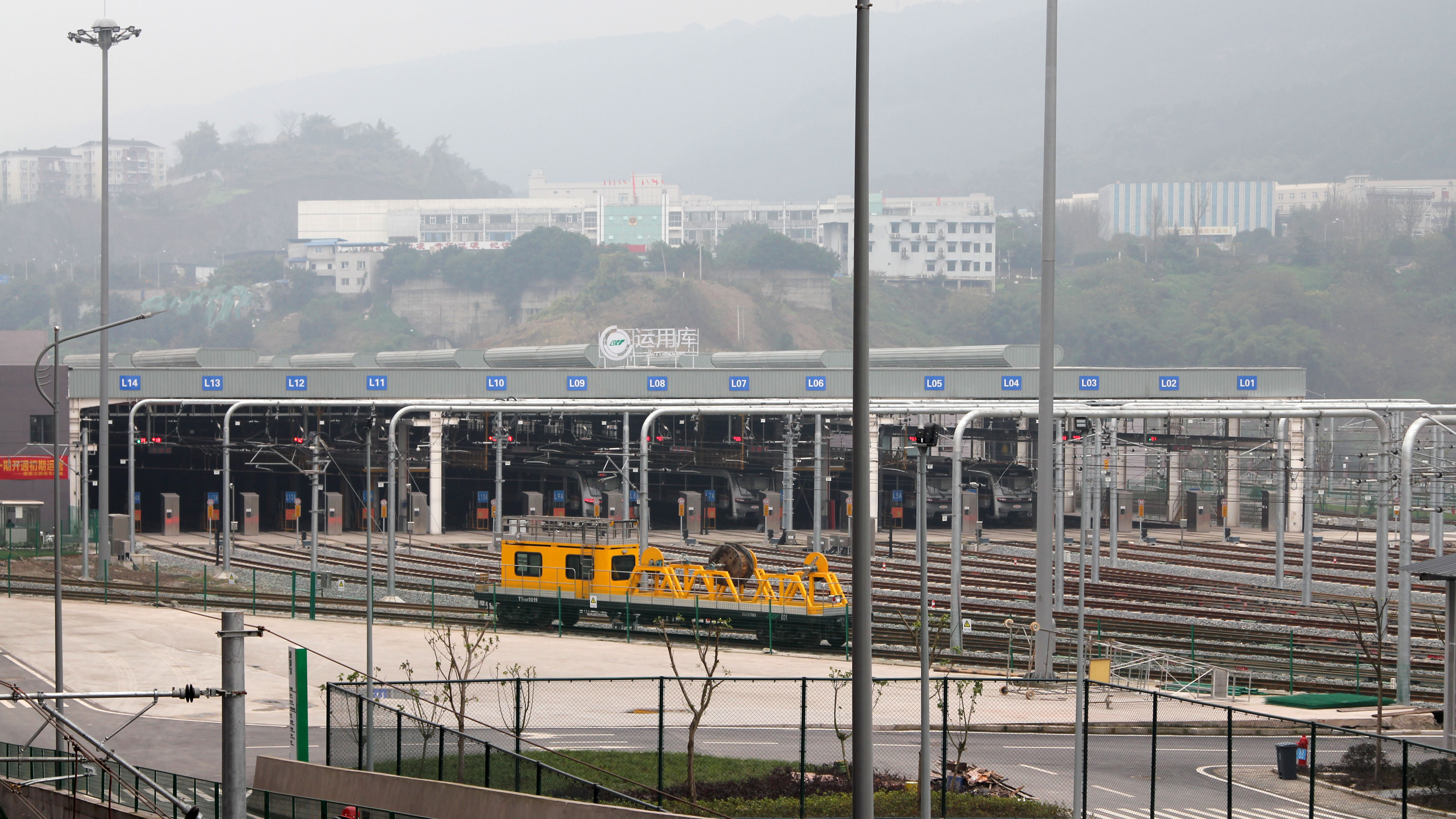 中文（中国大陆）: 唐家沱车辆段运用段